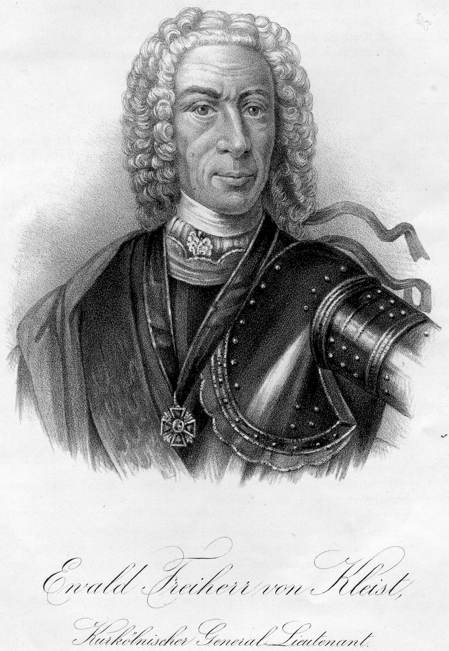 Porträt von Generalleutnant Ewald v. Kleist aus der FG